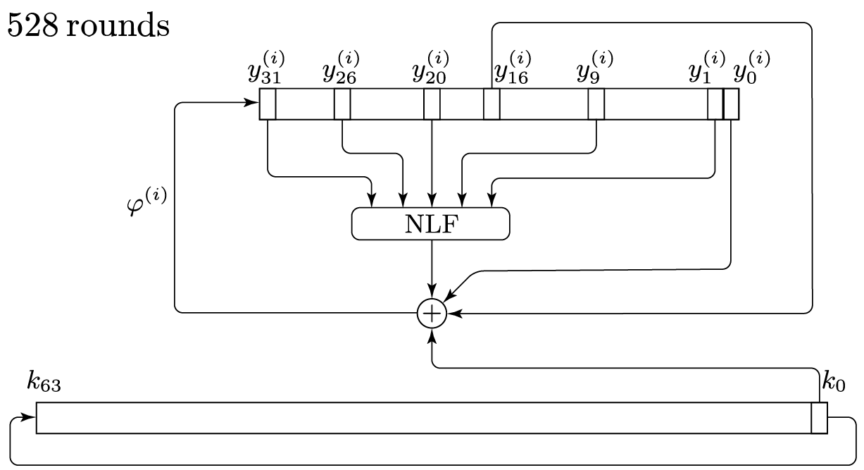 תרשים צופן keeLoq